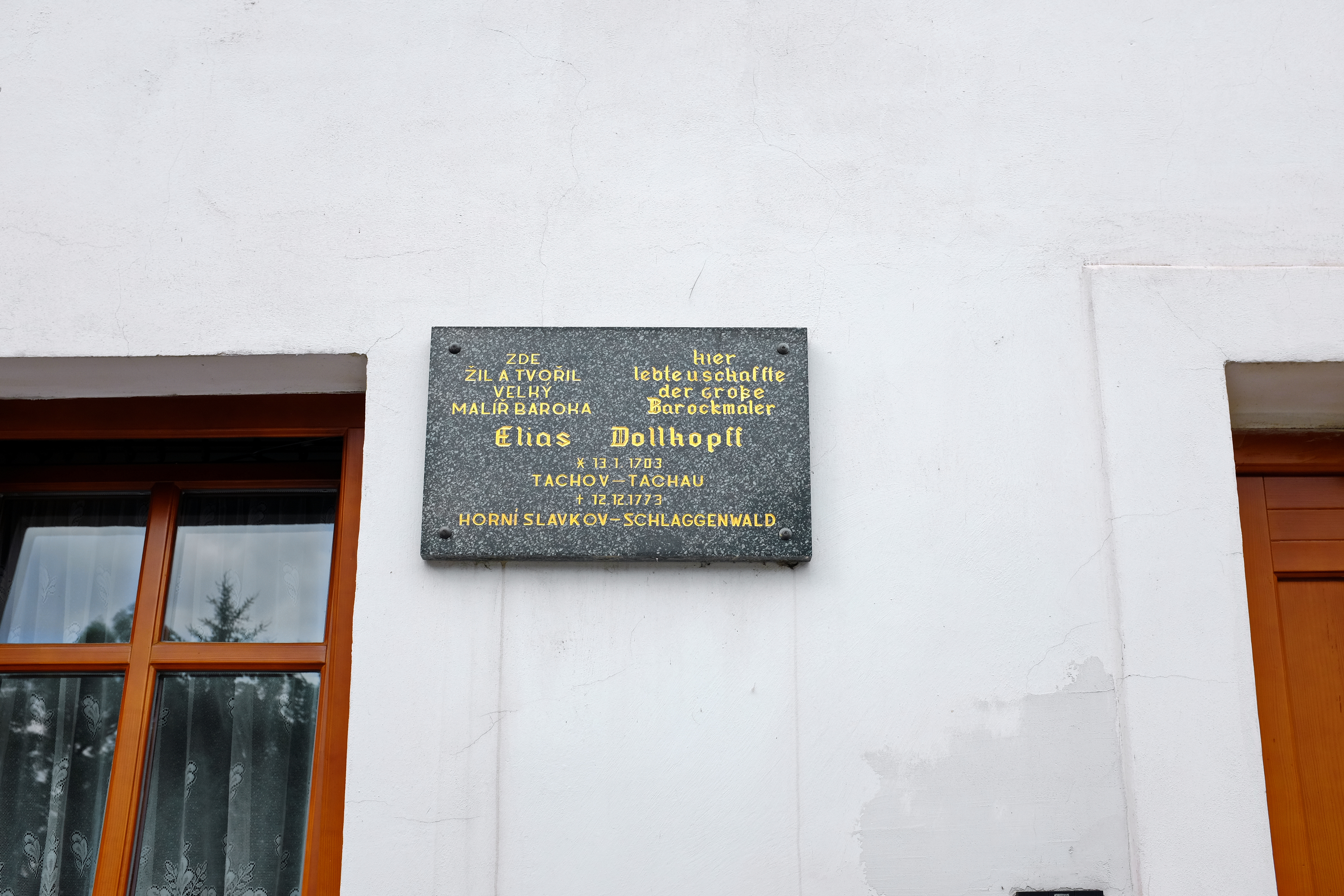 Horní Slavkov, Náměstí republiky, pamětní deska Eliase Dollhopffa na domu čp. 8